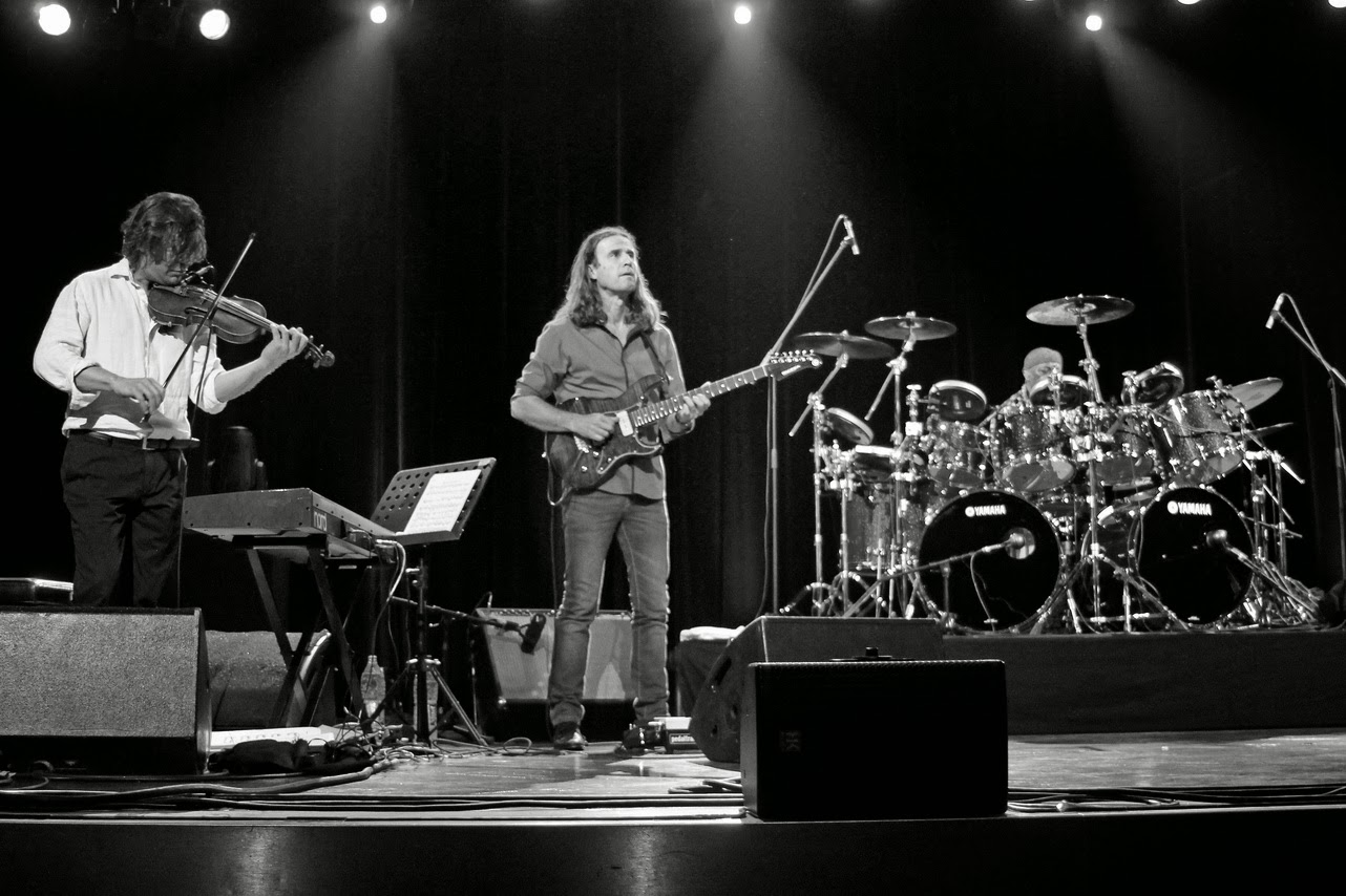 Billy Cobham + Band beim St. Ingberter Jazzfestival 2014